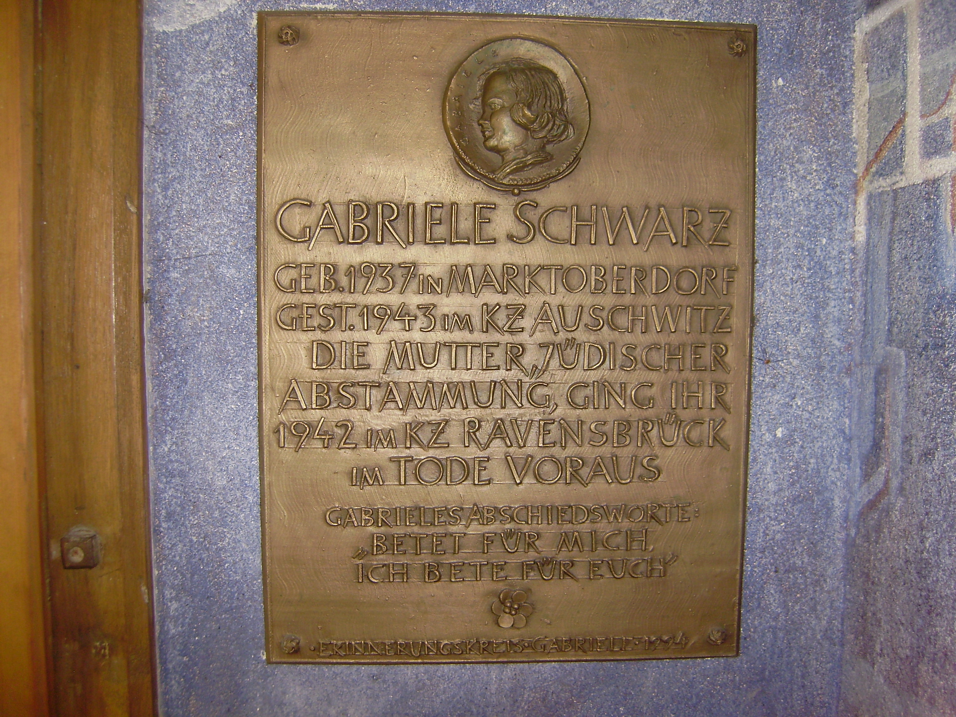 Gedenktafel Gabriele Schwarz-Eckart in der Spinnerkapelle Oberstaufen, Oberallgäu, Bayern, Germany